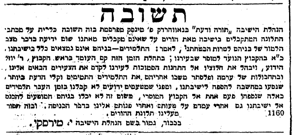 מודעה עיתונאית על כך שתלמידי ישיבת המוסר בנובהרדוק משפיעים על בחורים בתחנת הרכבת כדי שיבואו ללמוד בישיבתם